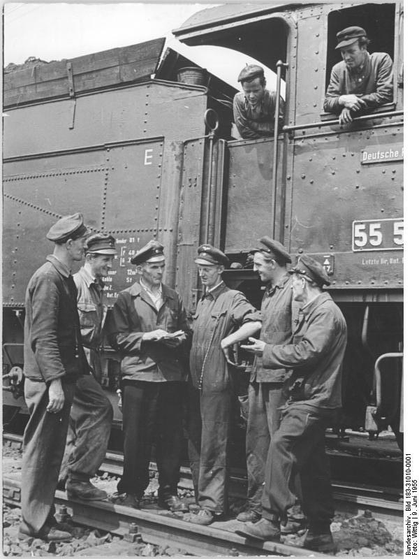 Dampflok (BR 55), Lokbrigade Zentralbild TBD-Wittig 9.6.1955 -2998- Zum "Tag des Eisenbahner" am 12.6.1955. Vorbildliche Komplexbrigade der Rangierer vom Güterbahnhof Erfurt. Noch vor einem Jahr bestanden auf dem Erfurter Güterbahnhof sieben Rangiererkolonnen und jede Kolonne bildete eine Brigade. Jede Brigade hatte eine eigene Norm, eigenen Wettbewerb usw. Die Kollegen Rangierer erkannten, dass die gesamte Leistung einer Schicht ausschlaggebend ist und schlossen deshalb alle Kollegen einer Arbeitsschicht zu einer Komplexbrigade zusammen. Dazu gehören: Die Rangierer, das Rangierlokpersonal, der Stellwerkdienst, der Wagenmeister und der Zugabfertigungsdienst. Ziel der Komplexbrigade ist, den Wagenumlauf zu beschleunigen, die Zahl der Unfälle zu vermindern und Verspätungen auszuschalten. UBz: Der Brigadier Max Voigt (3.v.l.) mit den Mitgliedern der Rangiererkolonne bei einer Zugbildung-Besprechung für einen Nahgüterzug.